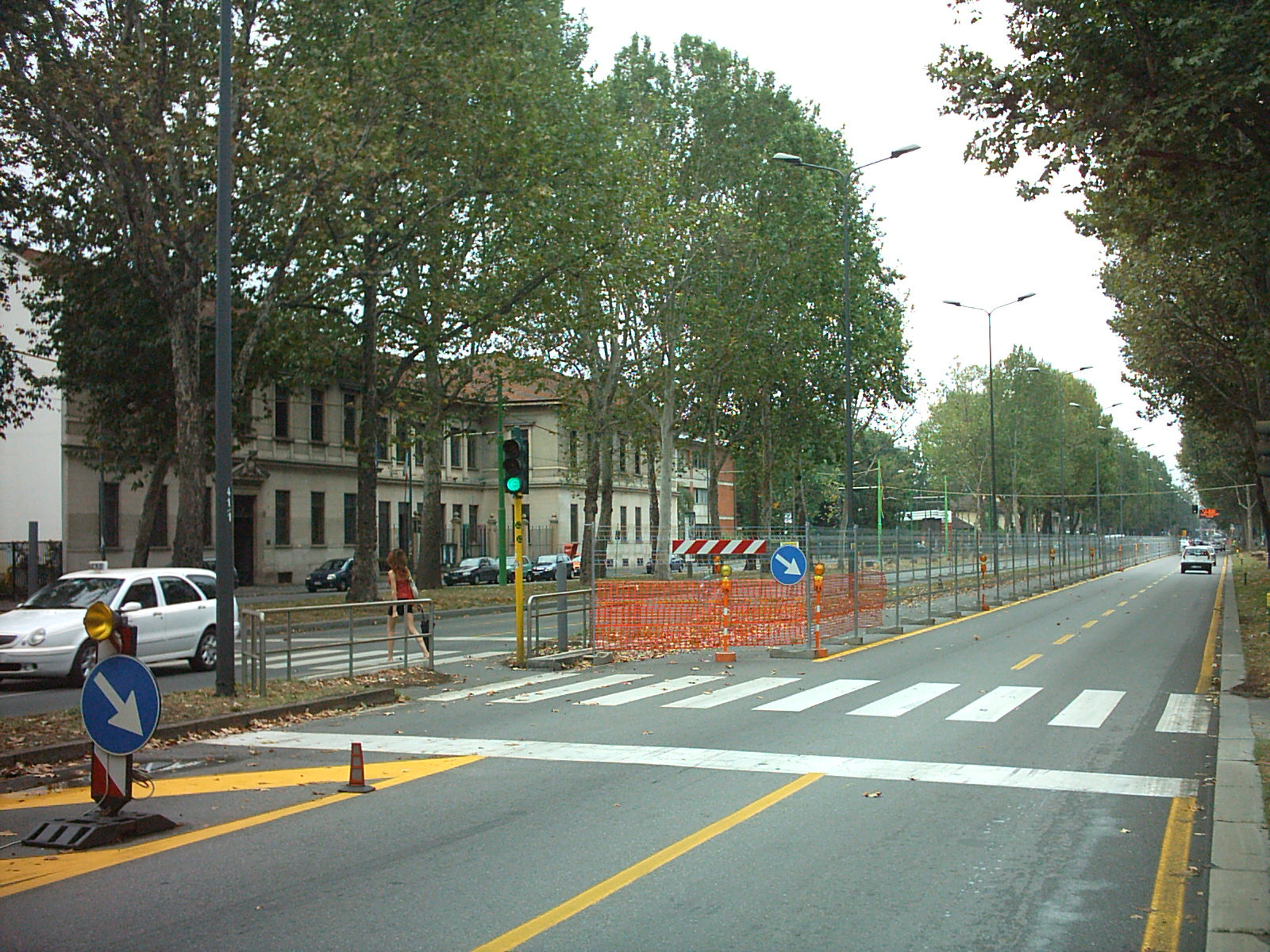 Recinzioni per la costruzione della linea 5 della Metropolitana Milanese in Viale Zara.